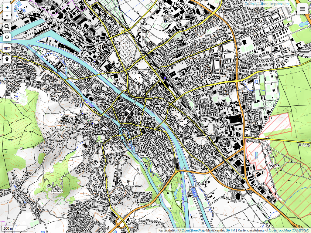 Bamberg in der OpenTopoMap - eine topographische Karte aus Daten der OpenStreetMap